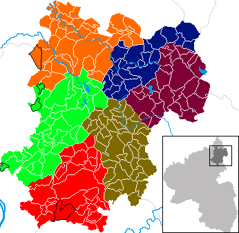 Die ehemaligen nassauischen Ämter Hachenburg, Marienberg, Montabaur, Rennerod, Selters, Wallmerod und Westerburg 1816-1886 im Gebiet des heutigen Westerwaldkreises (dargestellt sind heutige Ortsgemeindegrenzen). Schwarz umrandet sind Gemeinden oder Gemeindeteile, die heute nicht mehr zum Westerwaldkreis gehören. Orange = Amt Hachenburg Dunkelblau = Amt Marienberg Weinrot = Amt Rennerod Hellgrün = Amt Selters Ocker = Amt Wallmerod Rot = Amt Montabaur